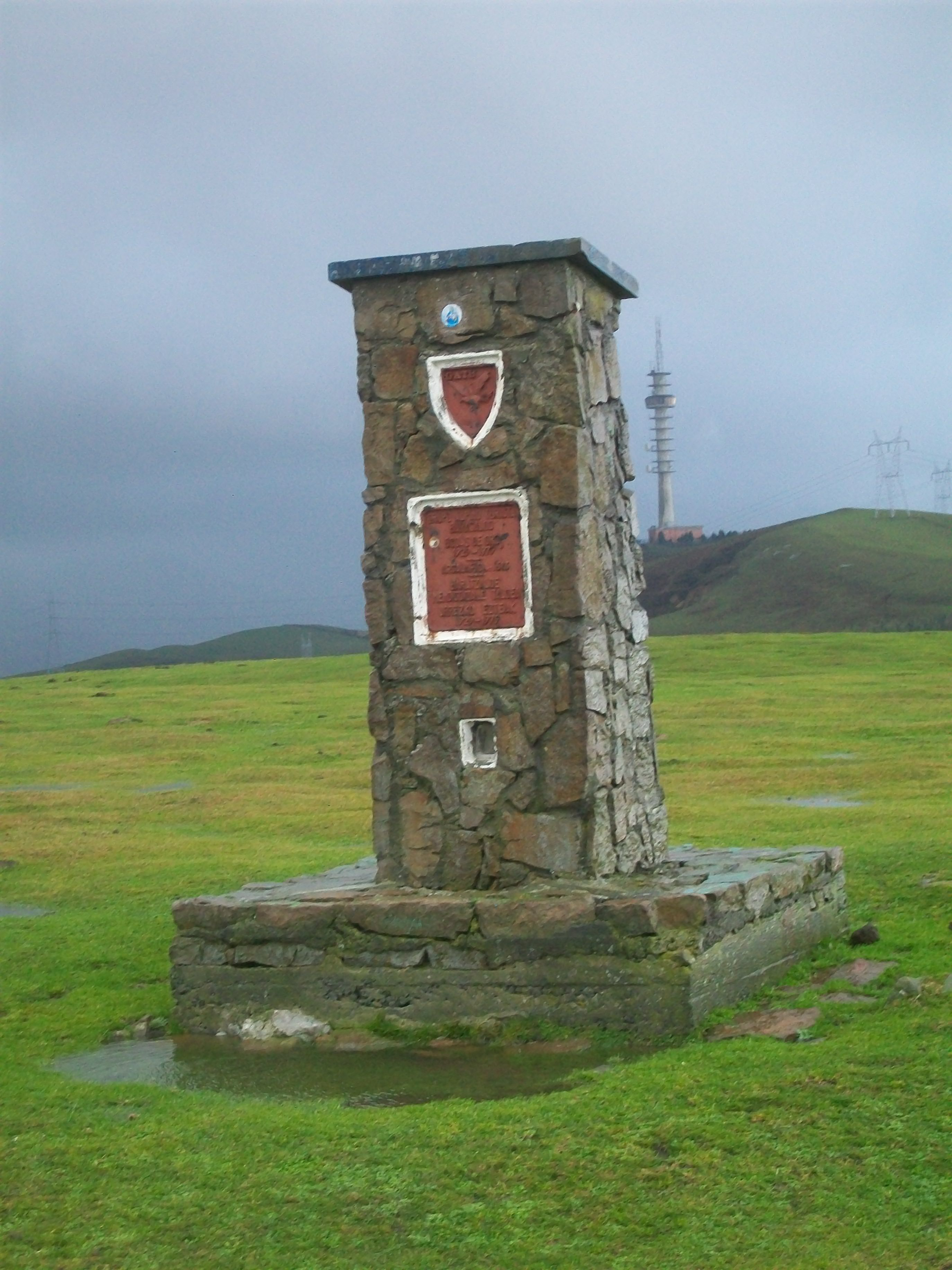 Argalario